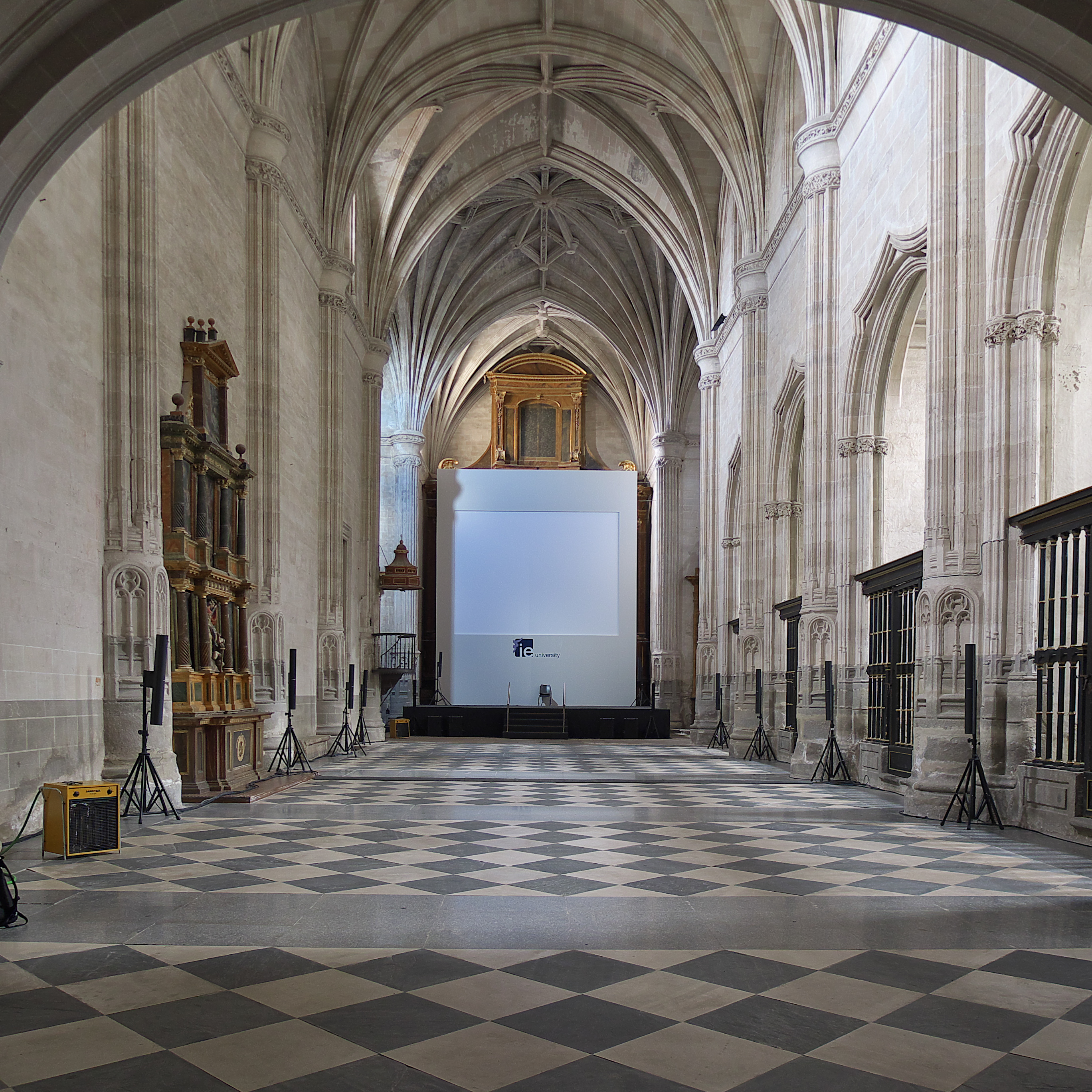 Interior de la iglesia del antiguo convento (1480-1490) en el que se aprecia el arte de Juan Guas.